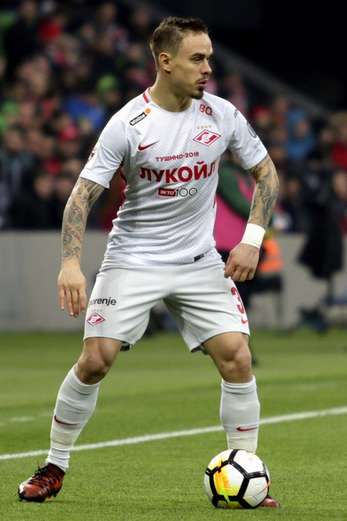 «Спартак» размялся в Краснодаре перед игрой с «Марибором»